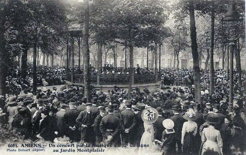 Un concert par la Musique du 72e de ligne au Jardin Montplaisir à Amiens. Photo Delsart. Carte oblitérée en 1908.